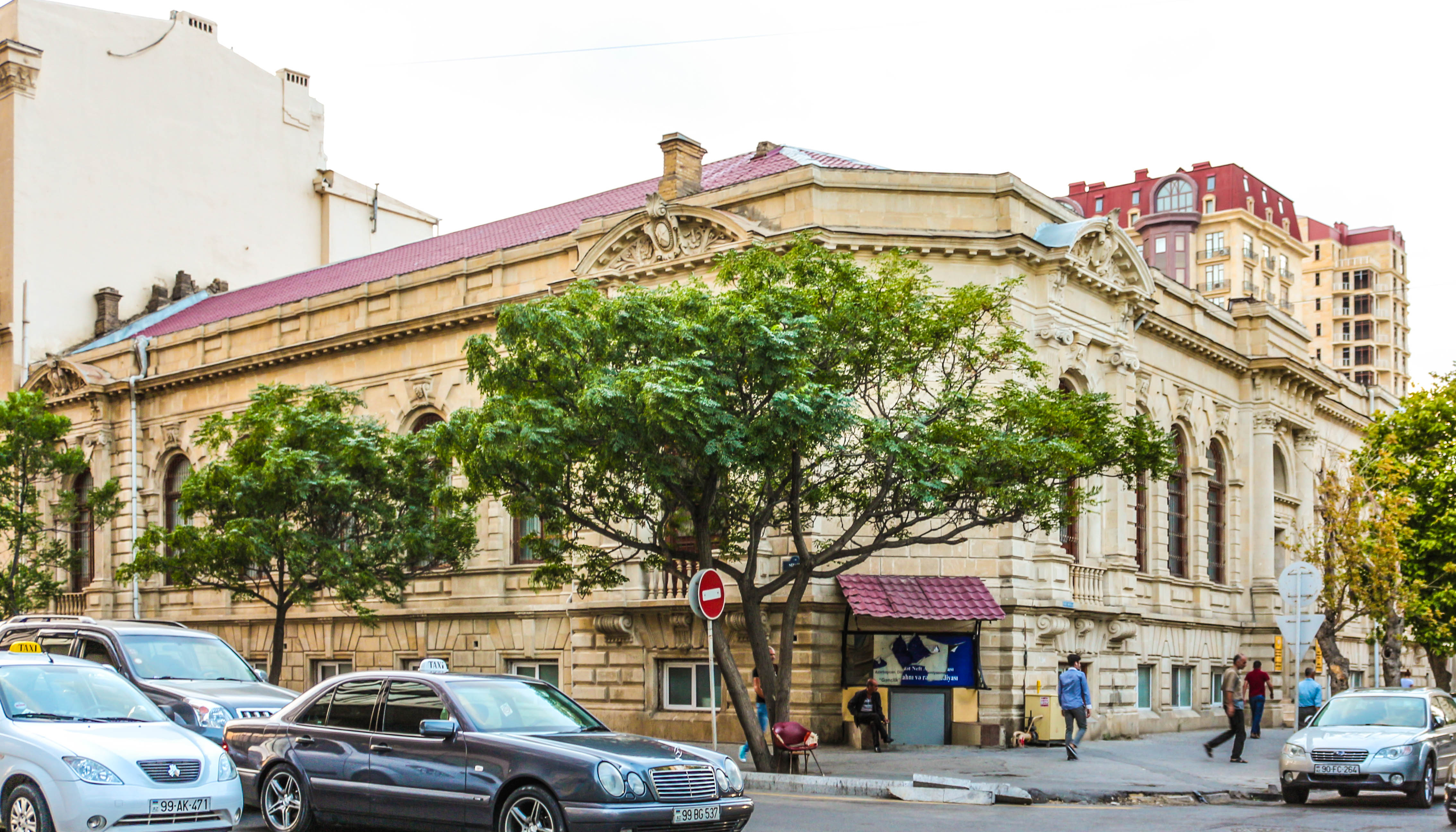 Xarici tələbələrin işləri üzrə Azərbaycan Respublikası Şurasının binası, 1898, memar. İ.Qoslavski, F.Əmirov küçəsi, 9